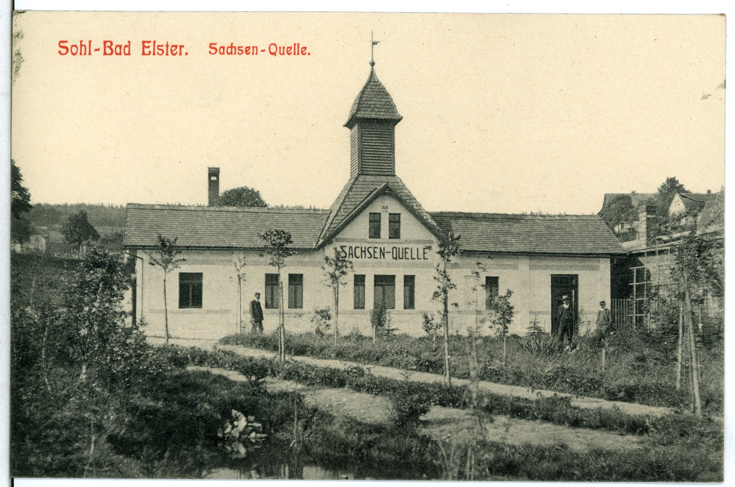 Bad Elster; Sohlbad - Sachsenquelle This postcard is from publisher Brück & Sohn in Meißen ( postcard has a unique number 11397 and is available in a higher resolution at the publisher. This images was uploaded in a cooperation project between Wikipedians and the publisher.